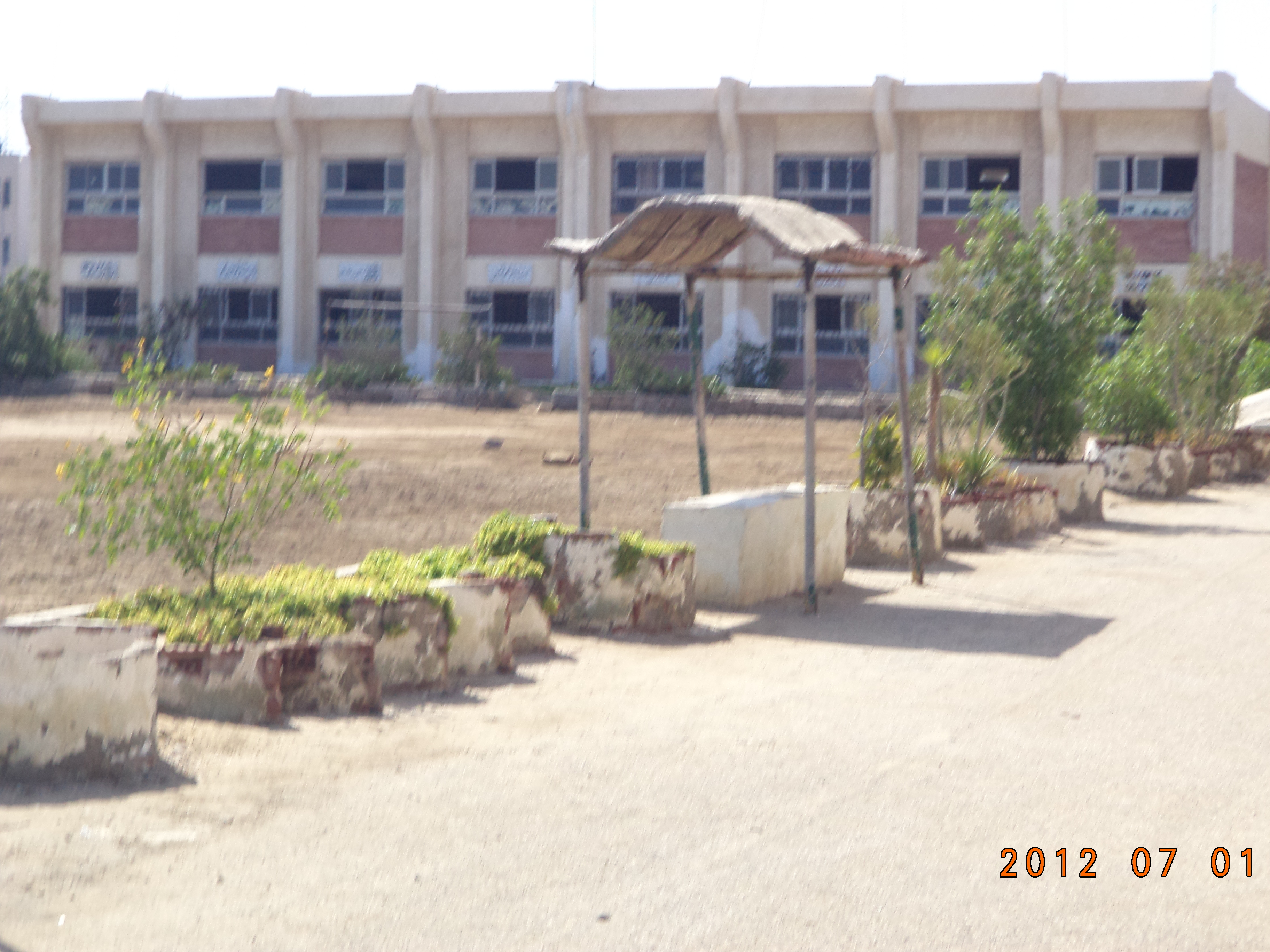 مدرسة بورسعيد الثانوية الزراعية المشتركة